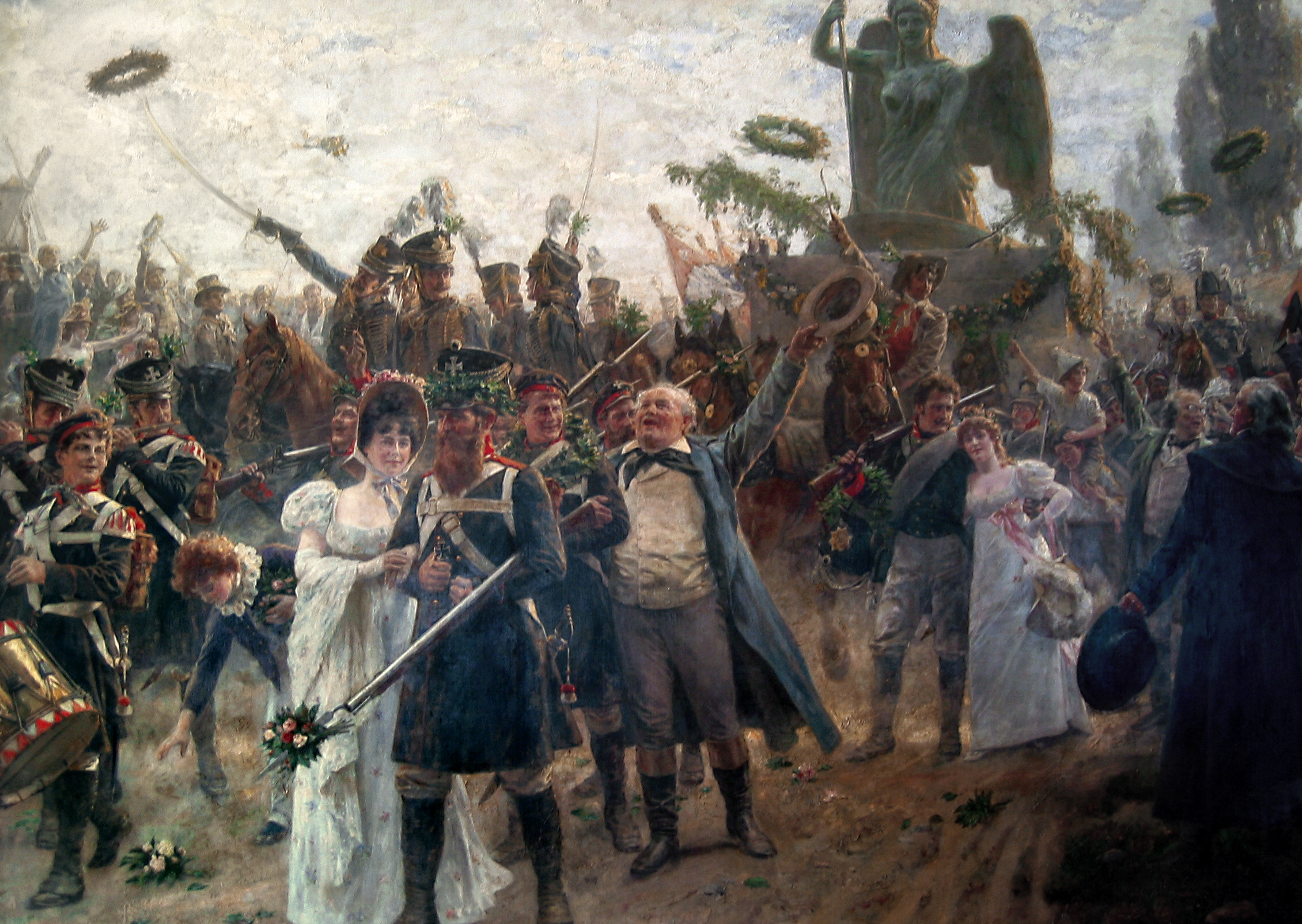 Rückkehr der Quadriga 1814